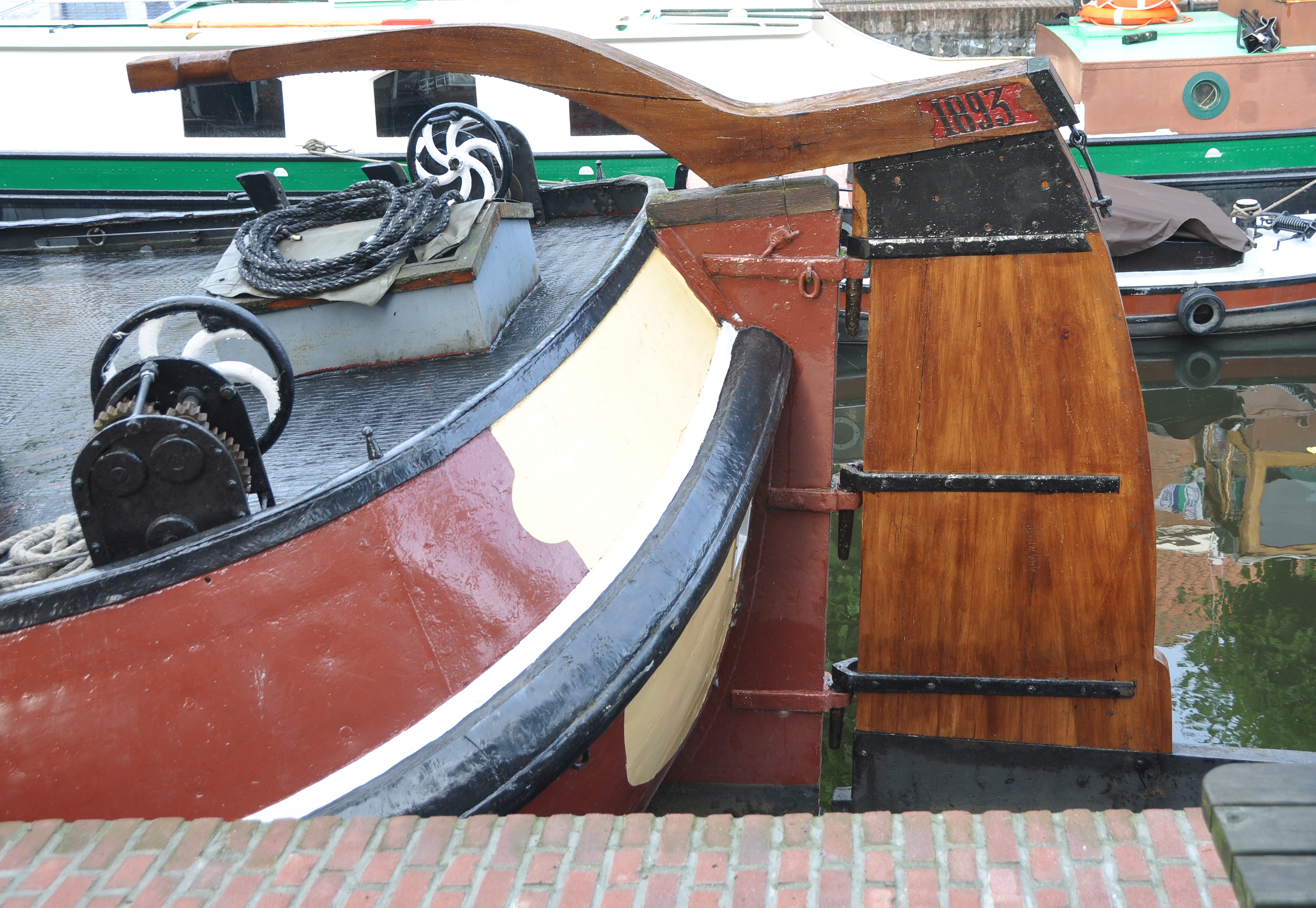 De EBENHAEZER bij de erfgoed manifestatie 2017 van de LVBHB in Hasselt.